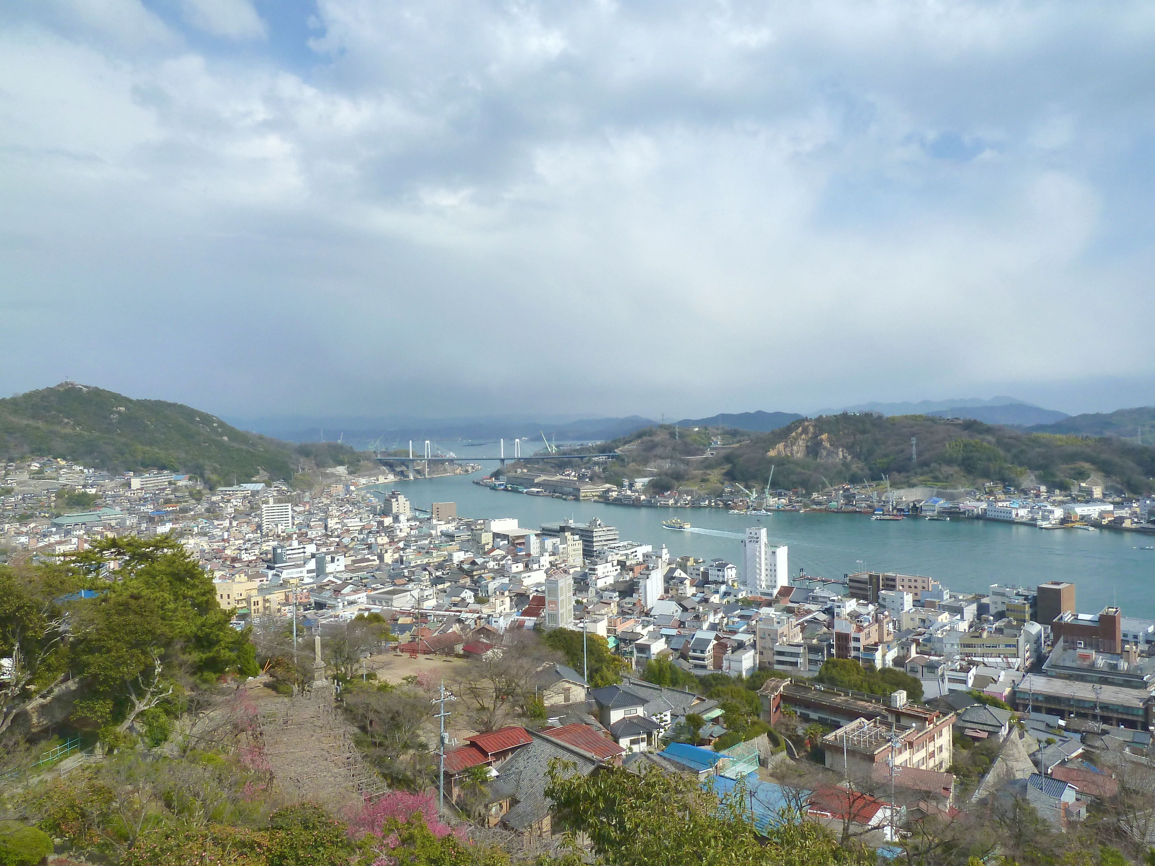 尾道市内風景